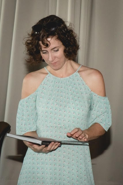 Die Autorin Ulrike Schrimpf bei der Preisverleihung der jungen Jury, Wien, 2017.